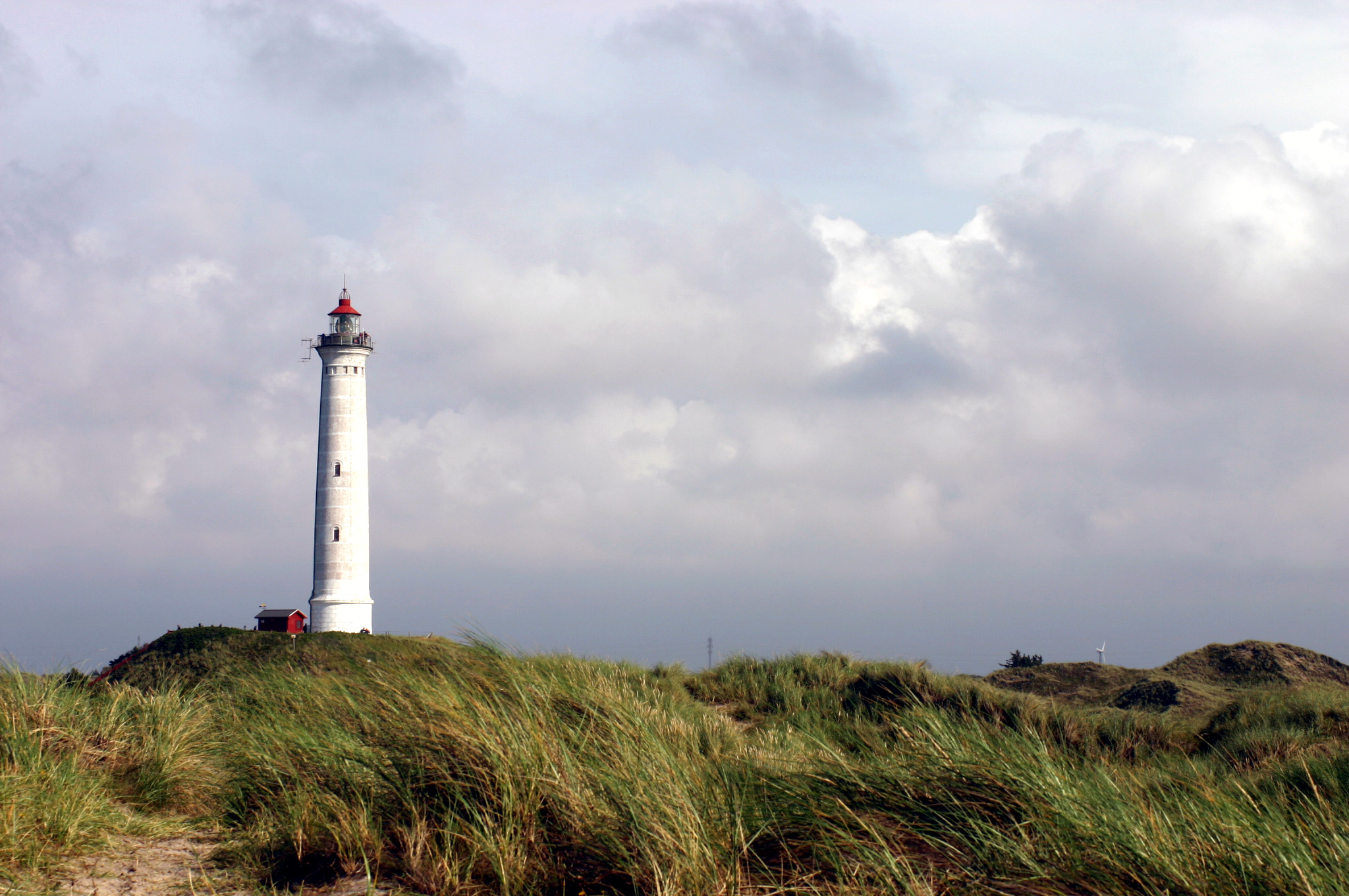 Lyngvig, Denmark, Lyngvig Fyr, Lighthouse